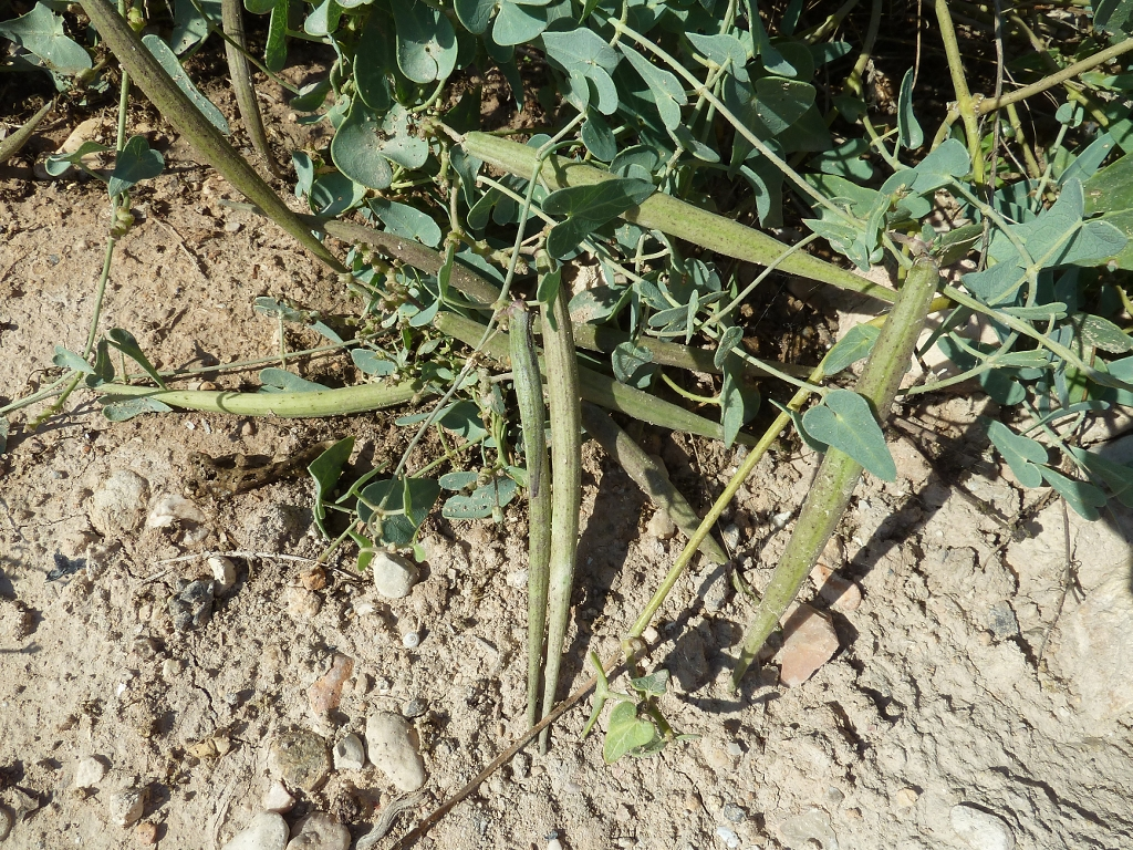 Cynanchum acutum (Matacán): Frutos inmaduros - La Huerta/Camino de la Azarbe de Patricio - Albatera (Alicante, España).